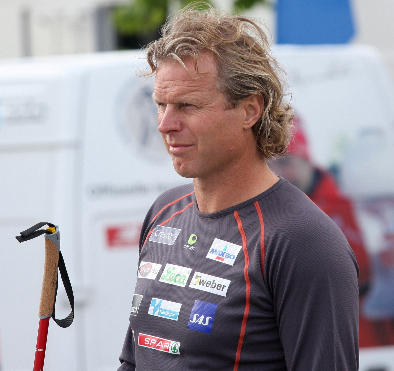 Åge Skinstad under Blinkfestivalen i Sandnes 2009